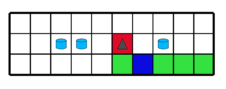 Fichas de Senet protegidas (cilíndricas)